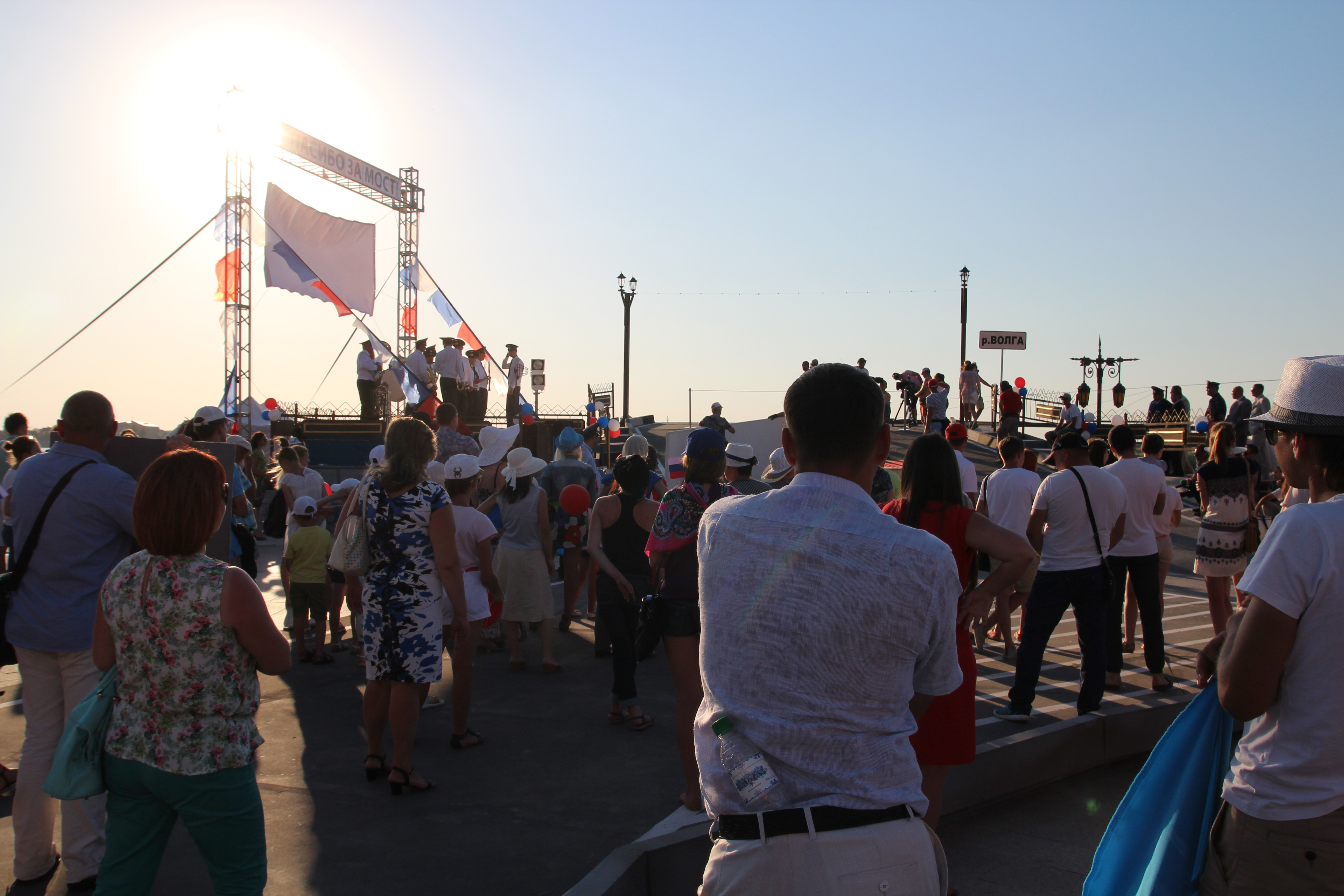 Съёмка фильма "День выборов 2". Эпизод с открытием моста.